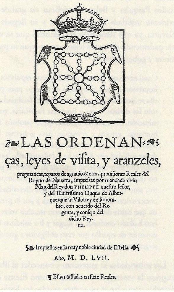 Ordenanzas ... del Reino de Navarra. Estella, Adrián de Amberes, 1557